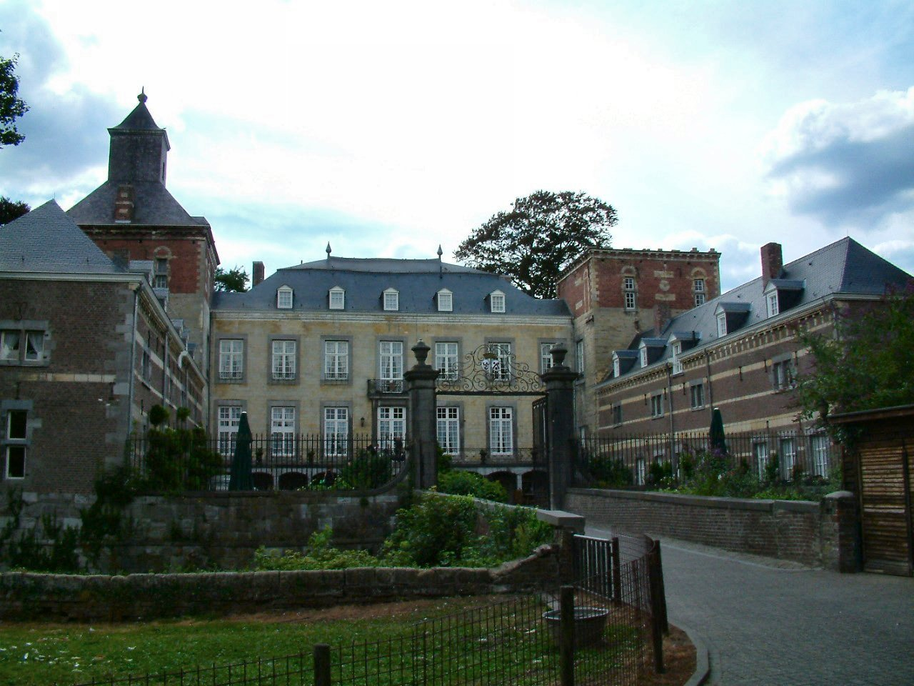 Description Kasteel Borgharen, hekwerk van Mathias Soiron. Licentie verstrekt P. Vossen Kasteel Borgharen, hekwerk van Mathias Soiron.